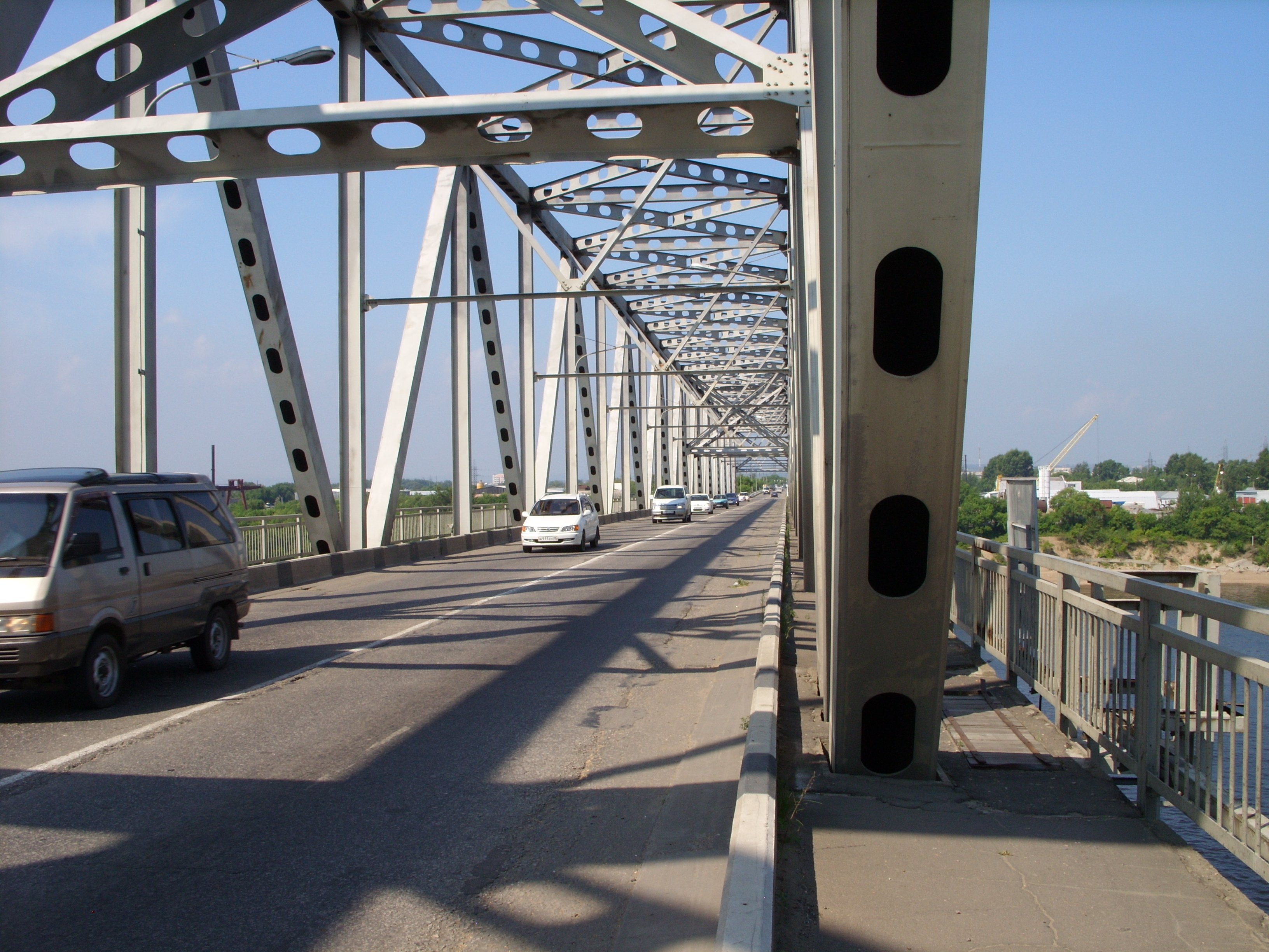 Снимки августа 2011 г.